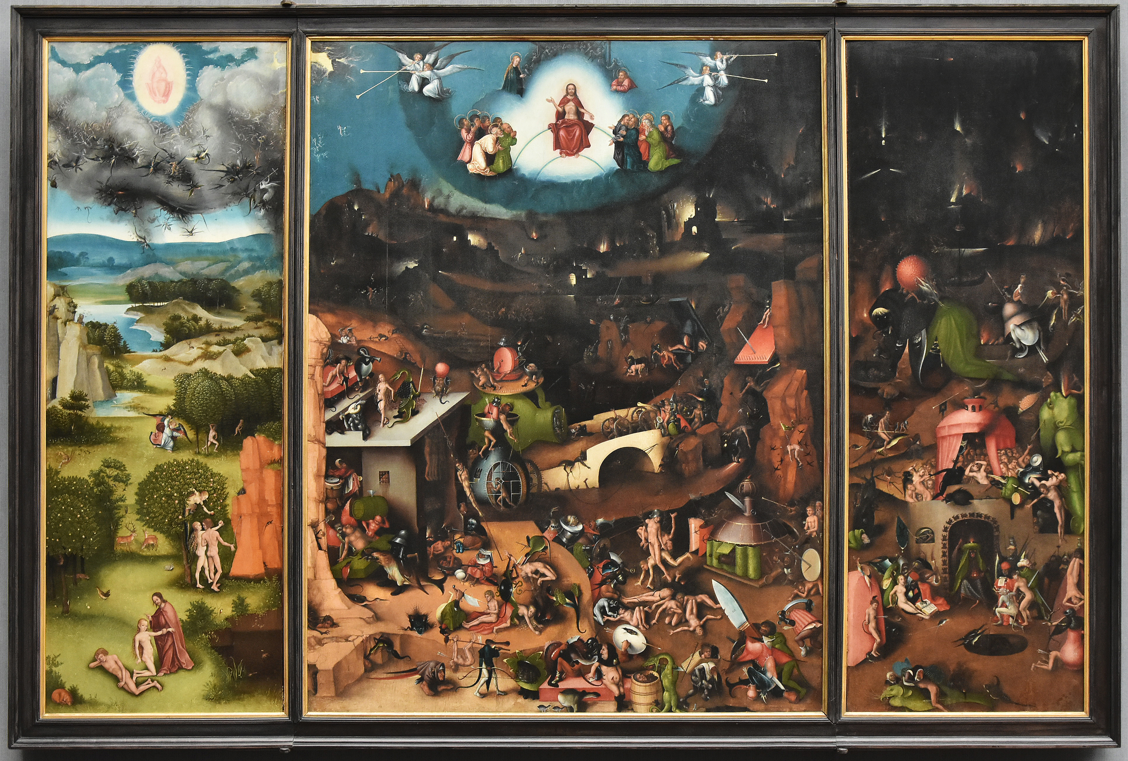 Lucas Cranach de Oude (1472-1553) Altaartriptiek met Het Laatste Oordeel Gemäldegalerie Berlijn 26-10-2018